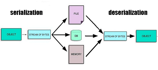 Схема на сериализация и десериализация